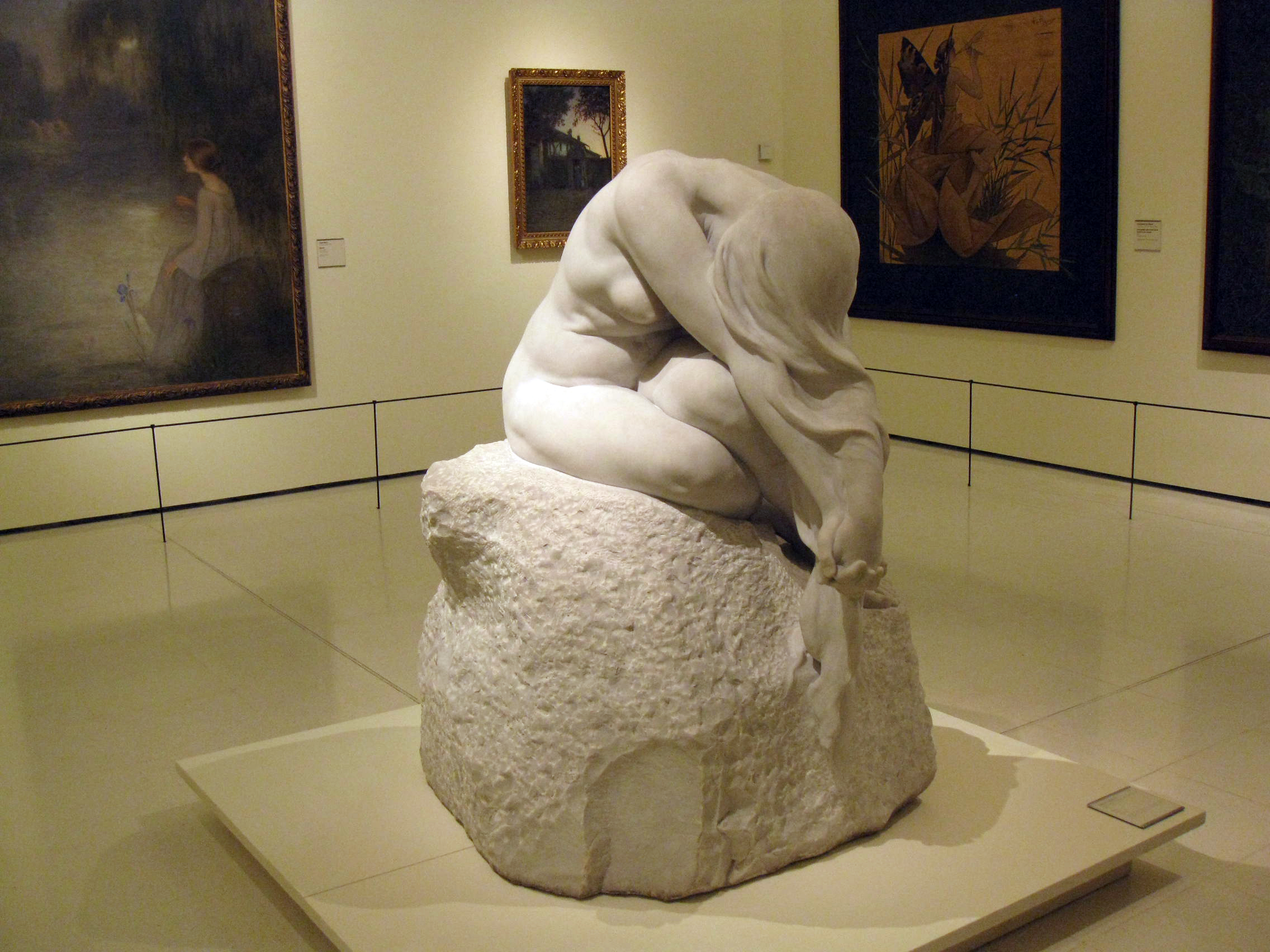 Palau Nacional (Barcelona)